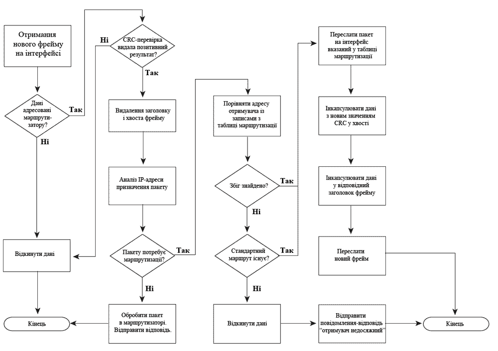 процес аналізу та інкапсуляції пакету в маршрутизаторі